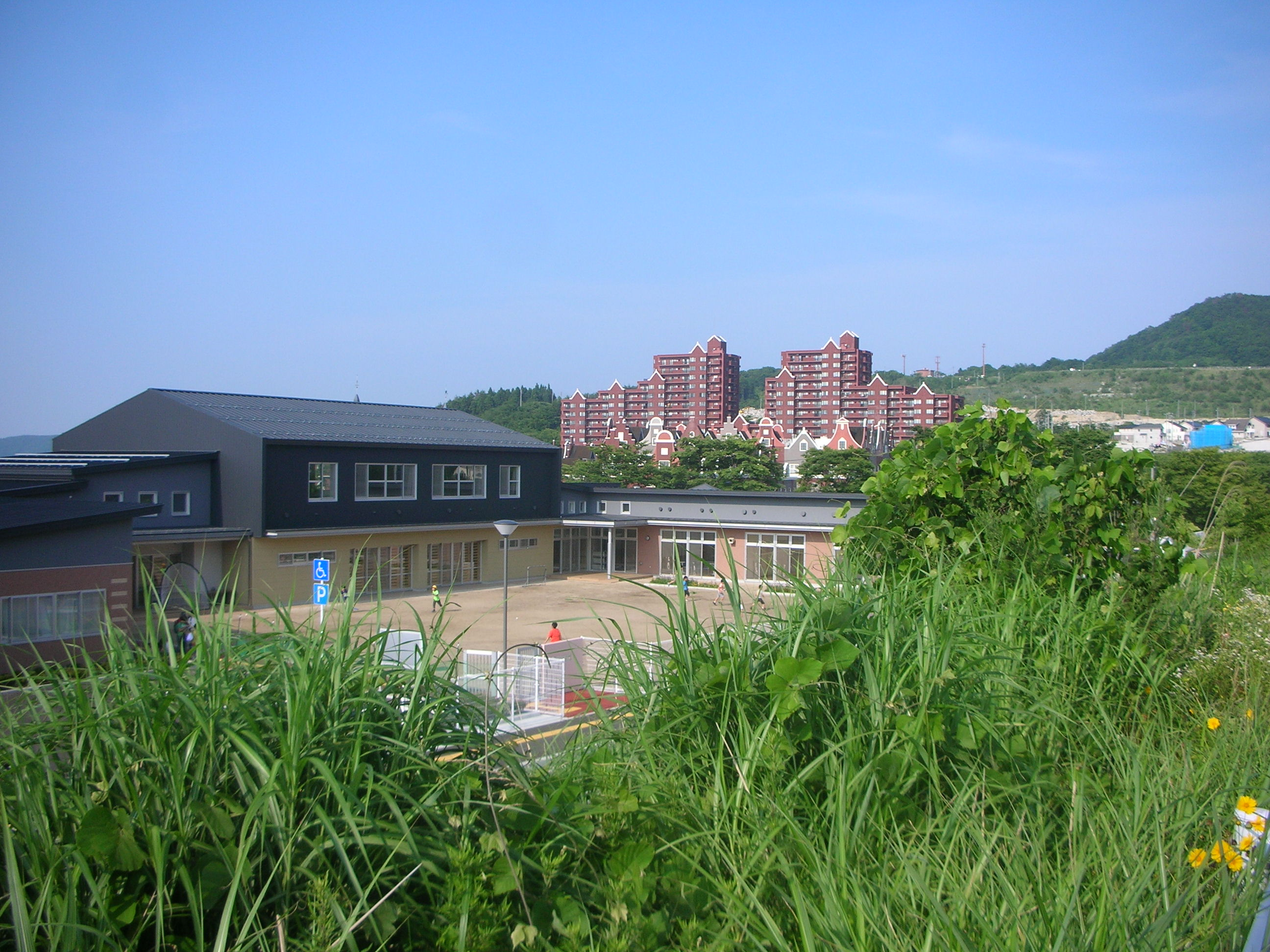 錦ケ丘小学校付近から